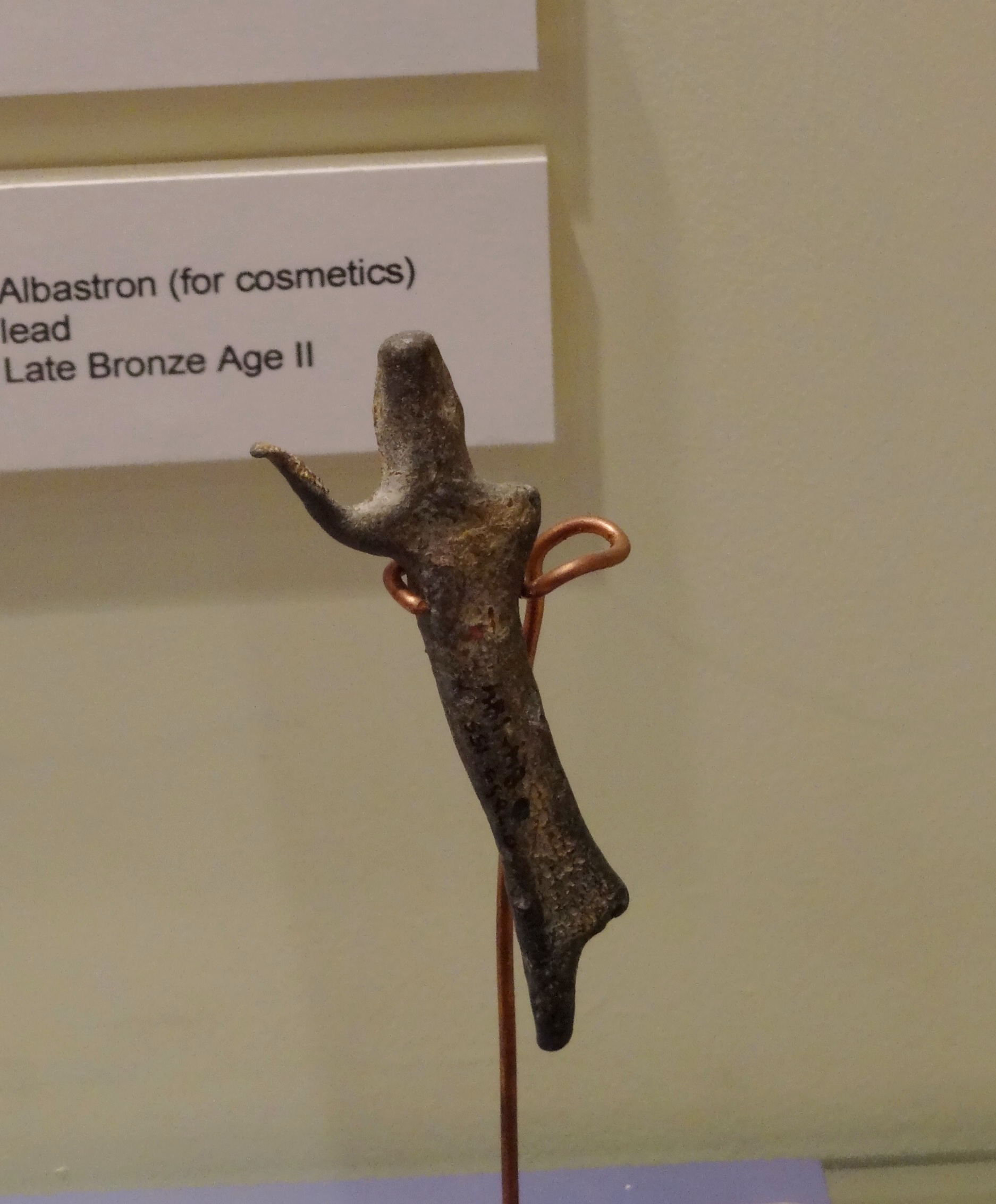 Archaeological Museum Beit Miriam in kibutz Palmahim, Israel מוזיאון בית מרים - הים ומלואו" הוא מוזיאון לארכאולוגיה השוכן בקיבוץ פלמחים מעל מצוק הצופה לים. המוזיאון מתרכז בממצאים ארכאולוגים שנחפרו באזור הקרוב לפלמחים, בחלקו התחתון של ערוץ נחל שורק וממצאים שנמשו מהים בקרבת הקיבוץ. צלמית של האל רשף מעופרת מתקופת הברונזה המאוחרת